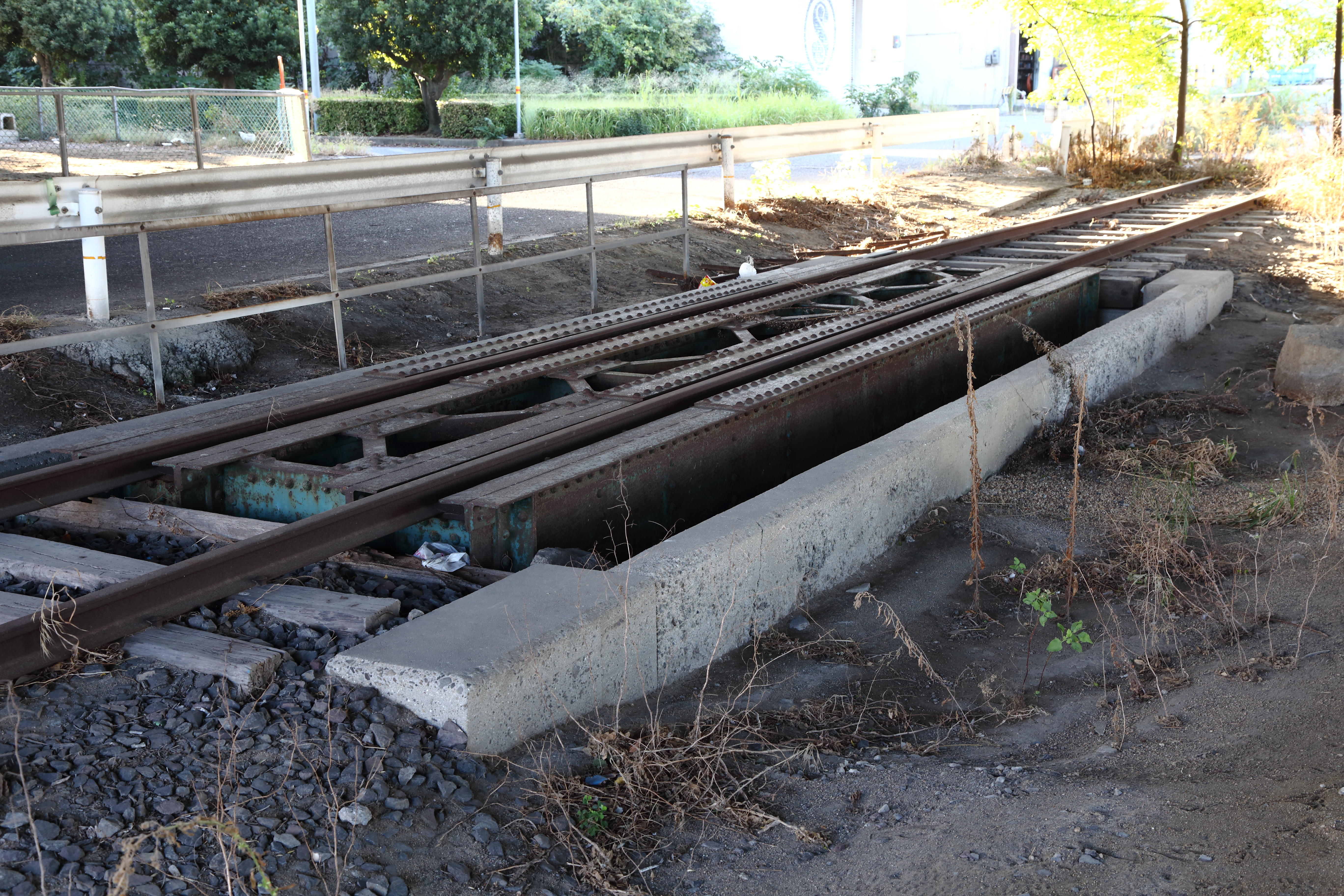 坂出貨物線跡 香川県坂出市入船町 ※香川県道186号線（両景橋）交差地点